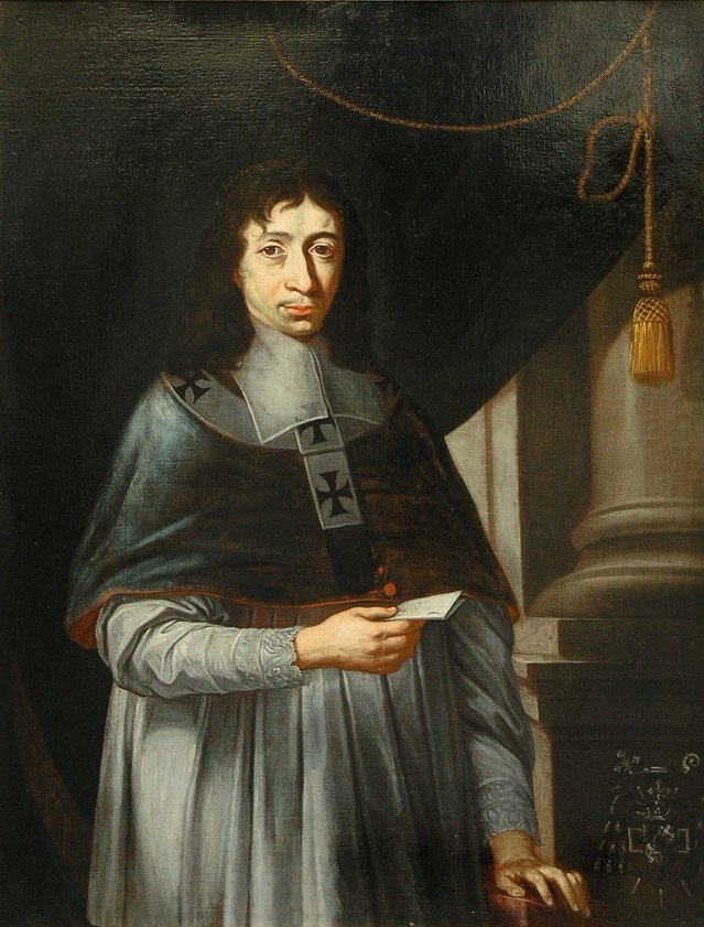 Jan Bedřich z Valdštejna (c.1644-1694), 16. arcibiskup pražský